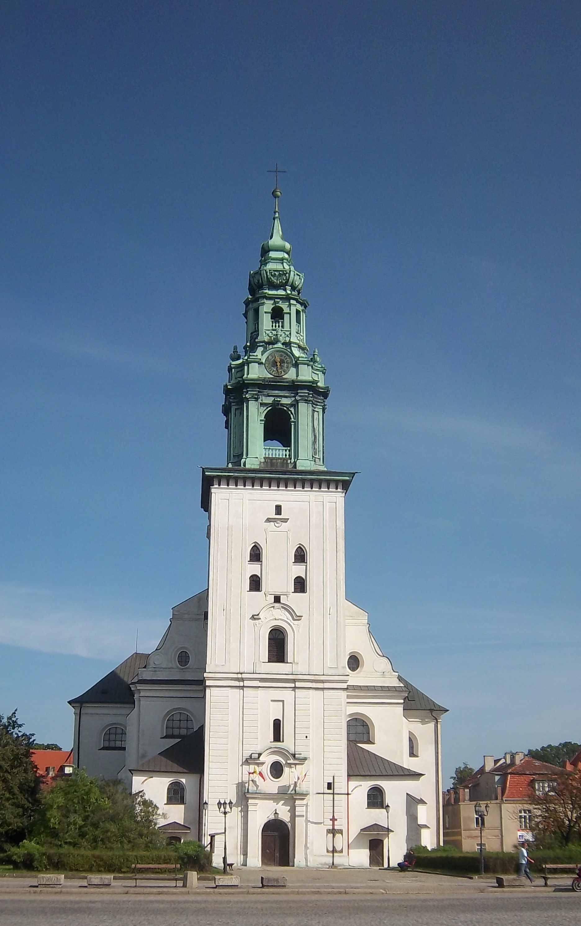 Krosno Odrzańskie - dawny kościół ewangelicki, obecnie rzymskokatolicki parafialny p.w. św. Jadwigi, (XV), 1708-1729, XIX